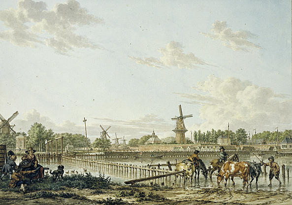 Paardenwed bij de Amstel, tekening door Jacob Cats, 1784.